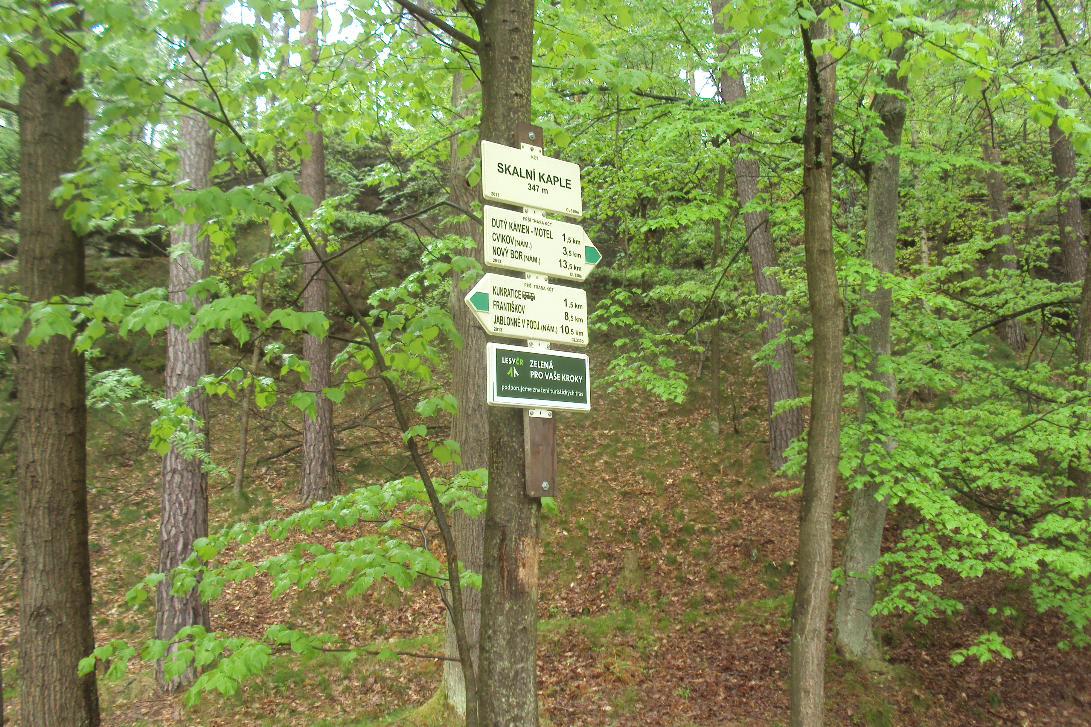 Skalní kaple je v polovině cesty mezi obcemi Drnovec a Kunratice u Cvikova